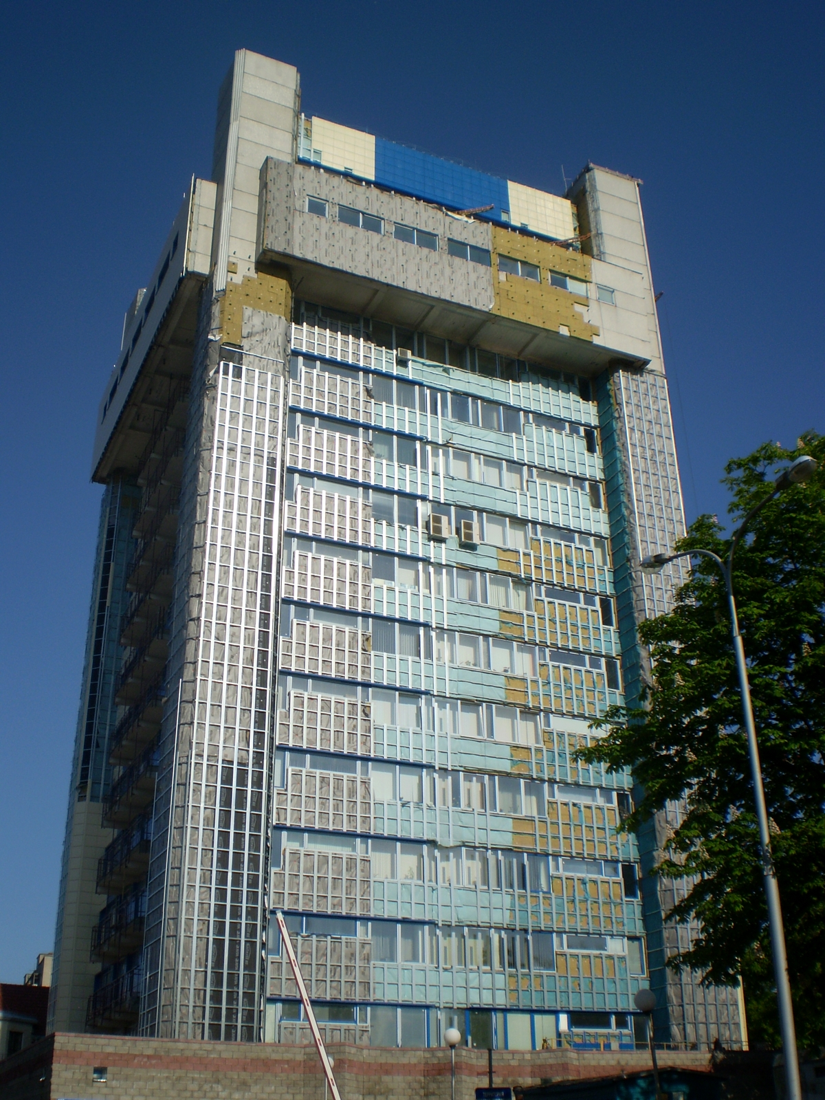 Статыстыка